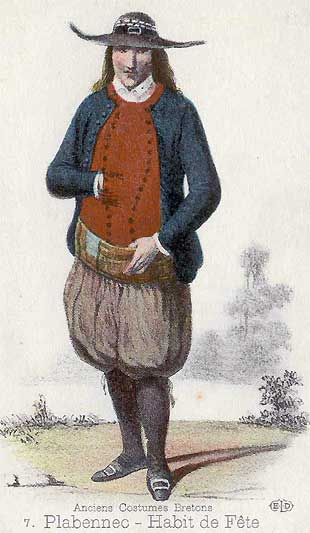 Habit de fête d'un homme à Plabennec.